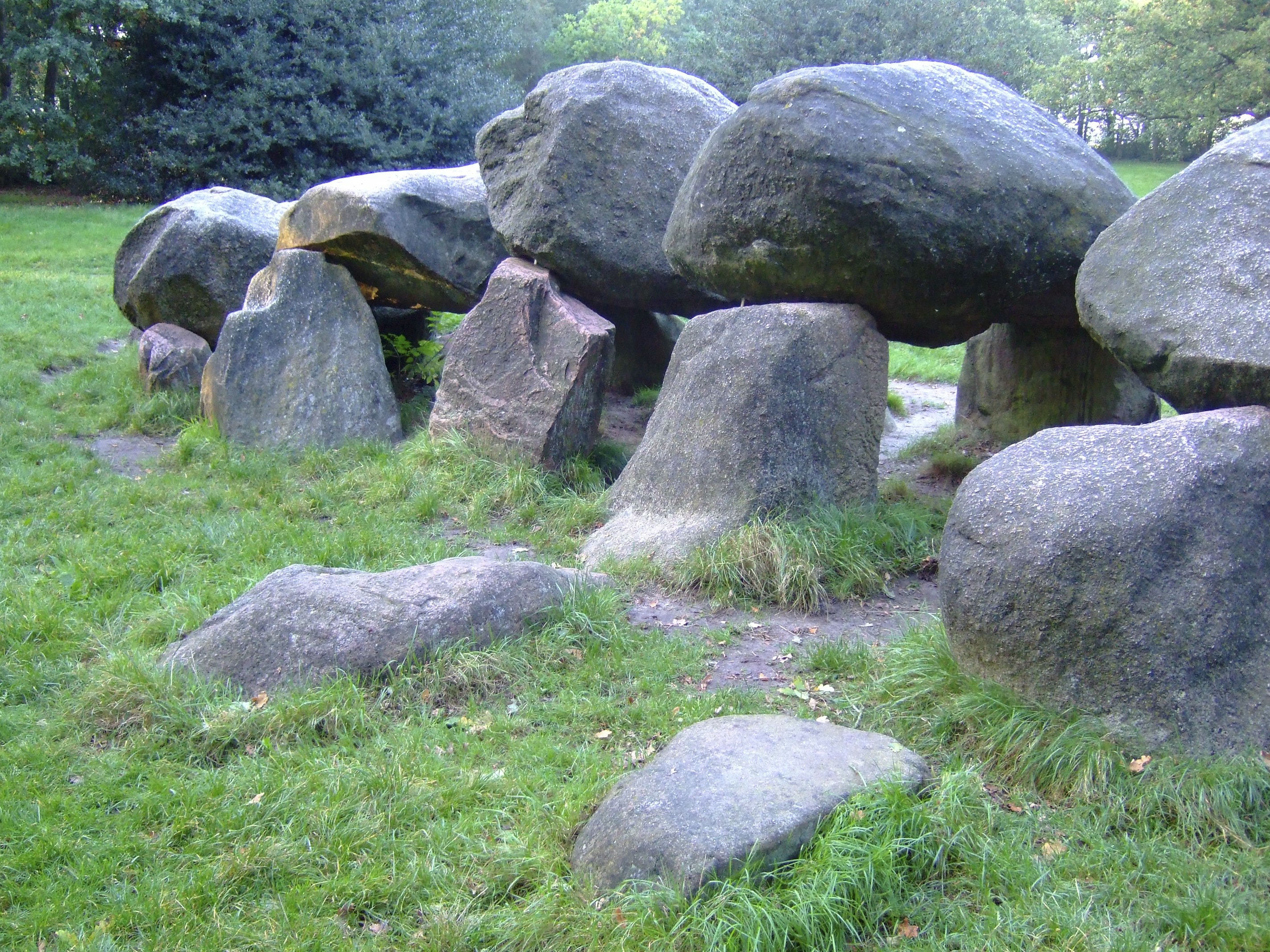 Archeologie/ Hunebed: Zicht op hunebed D18, Archeoregio 1 (opmerking: Publicatie Uit Balans 2006)